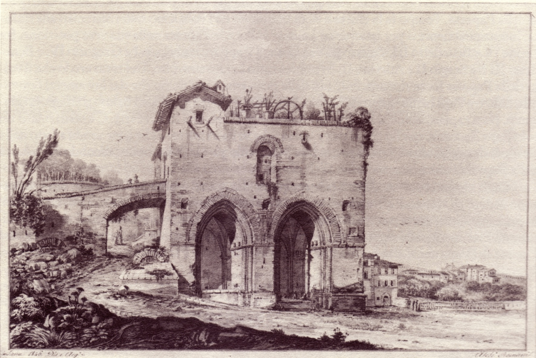 Fonte Nuova, 1846, disegno. Siena, Biblioteca Comunale degli Intronati, Ms. E 4. 11, Il Taccuino senese di Alessandro Romani.